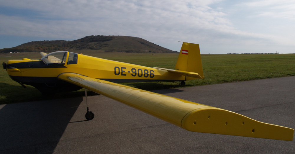 SF25c am Flugsportzentrum Spitzerberg (Österreich)